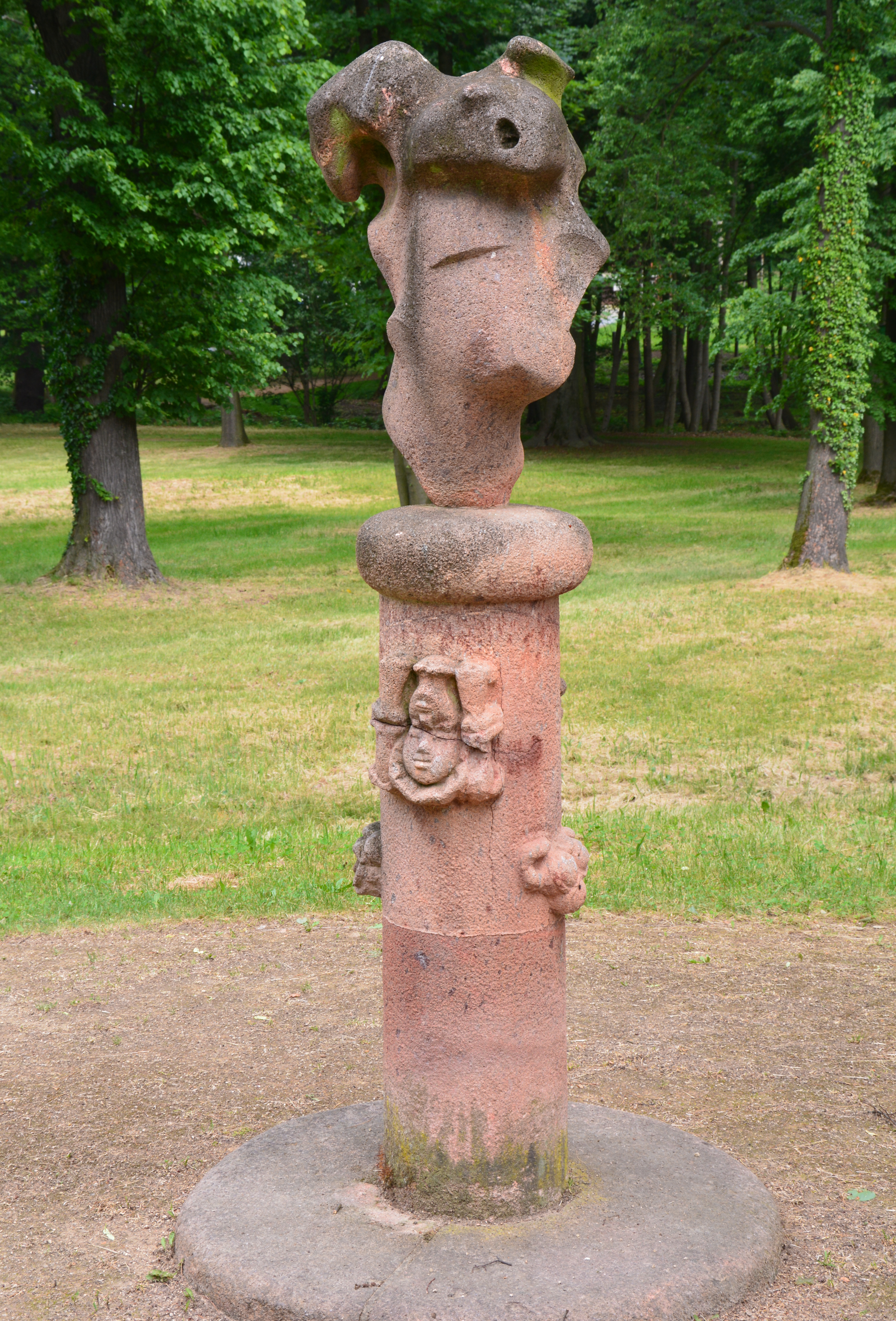 Schloss Lauterbach im Landkreis Meißen, Mai 2017, Skulptur Harlekin des Bildhauers Roland Rother.